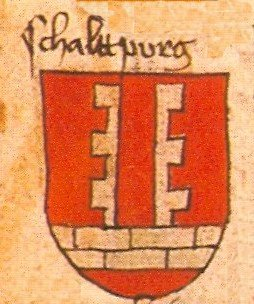 Wappen Schalksburg eingescannt aus: Württemberg und Mömpelgard: 600 Jahre Begegnung. Beiträge zur wissenschaftlichen Tagung vom 17. bis 19. September 1997 im Hauptsaatsarchiv Stuttgart. Herausgegeben von Sönke Lorenz und Peter Rückert. Leinfelden-Echterdingen, 1999